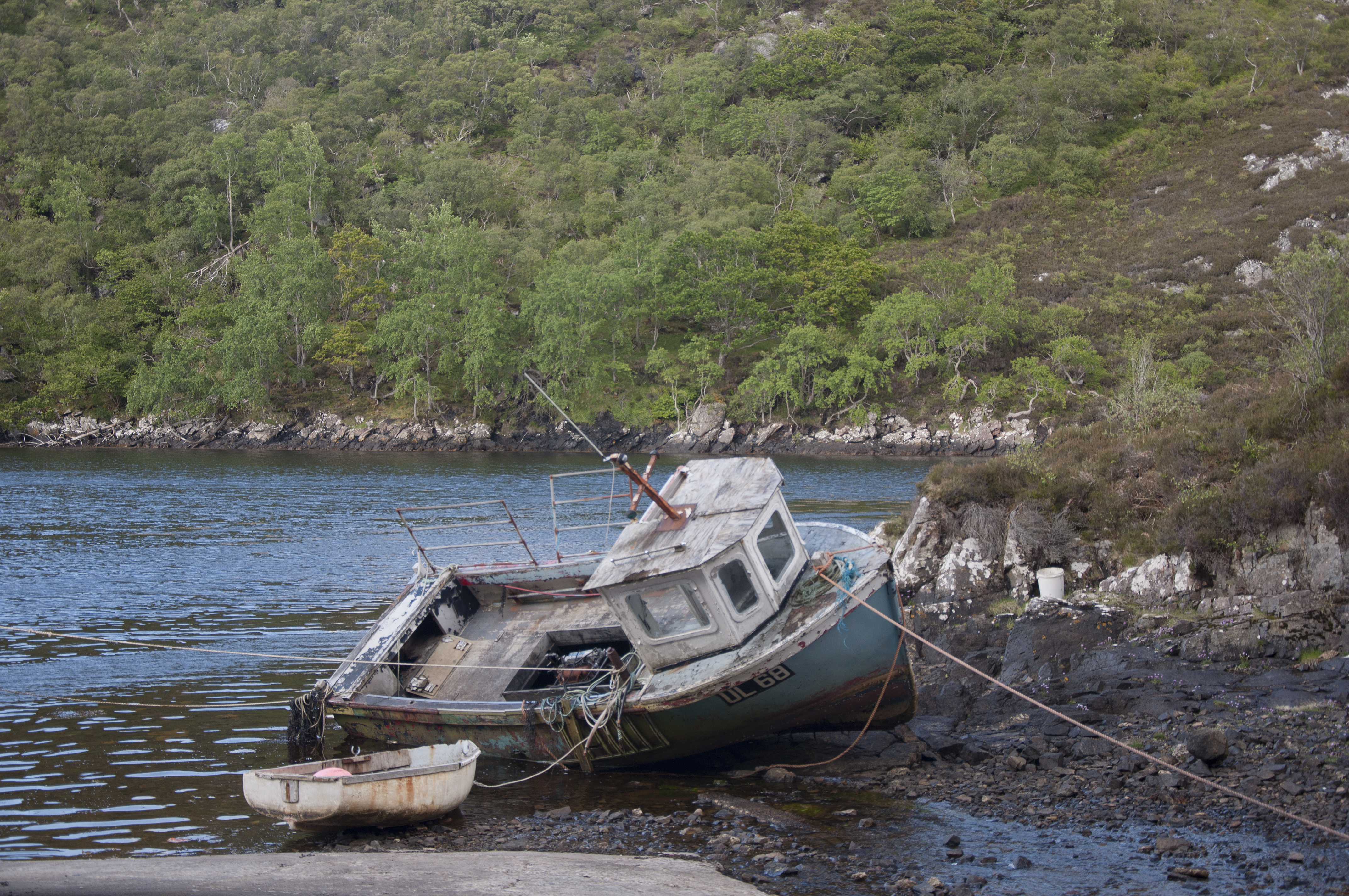 Loch Nedd, Sutherland, Schotland